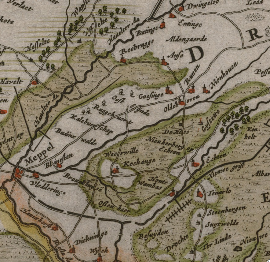 Detail van een oude kaart van Drenthe uit 1634